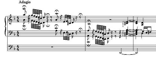 Bach Toccata d-moll BWV 565 begin